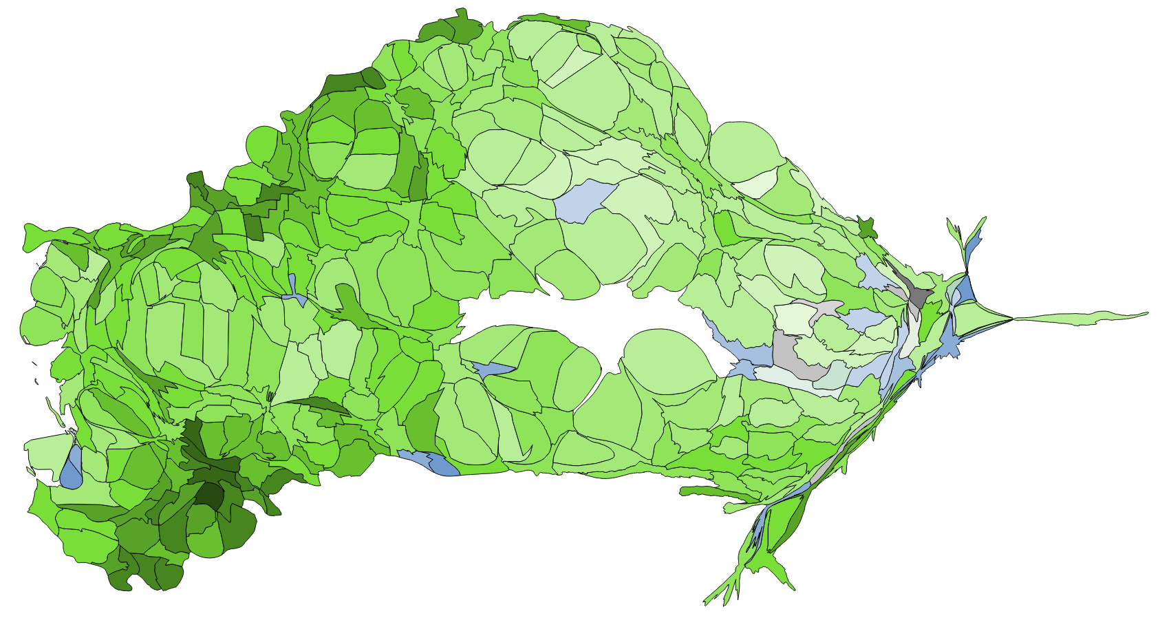 顏色對照表